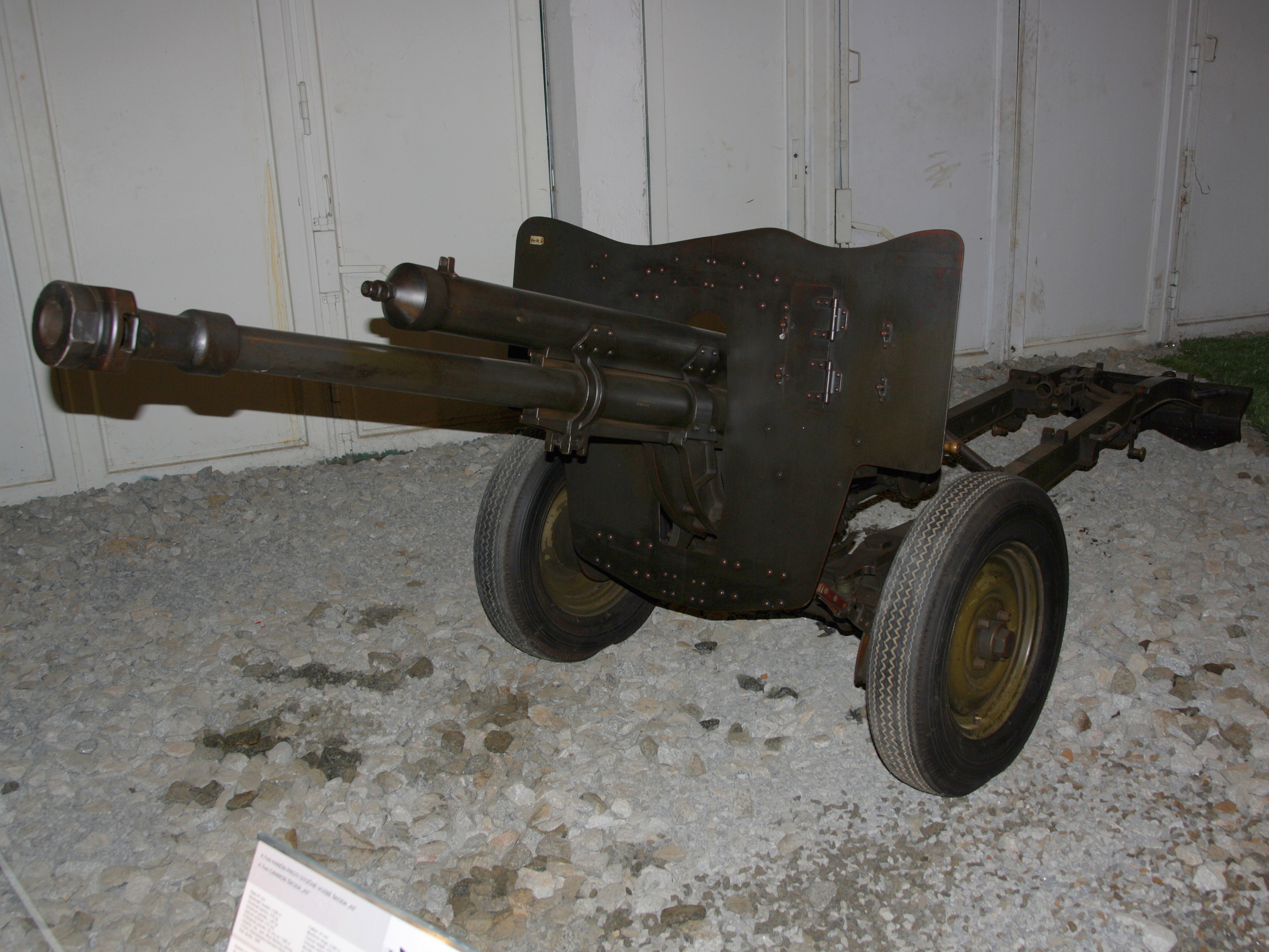 Military museum Lešany - 4,7cm KPÚV vz. 38.